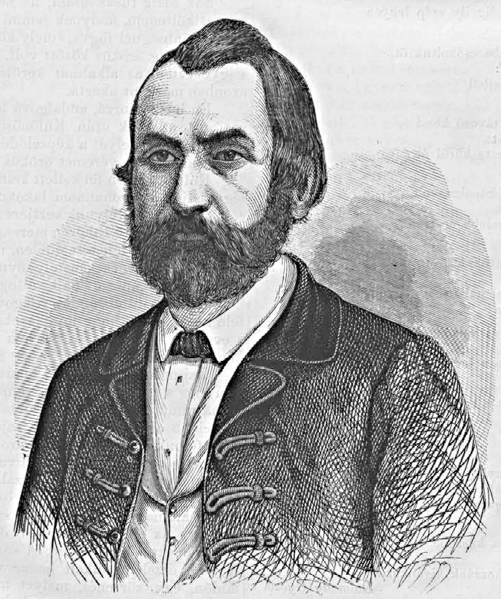 Rónay Jácint (1814–1889) Benedek-rendi tanár, író, természettudós, a darwinizmus első és legismertebb magyarországi terjesztője, az Magyar Tudományos Akadémia tagja (Vasárnapi Ujság, 1862.január 26.)